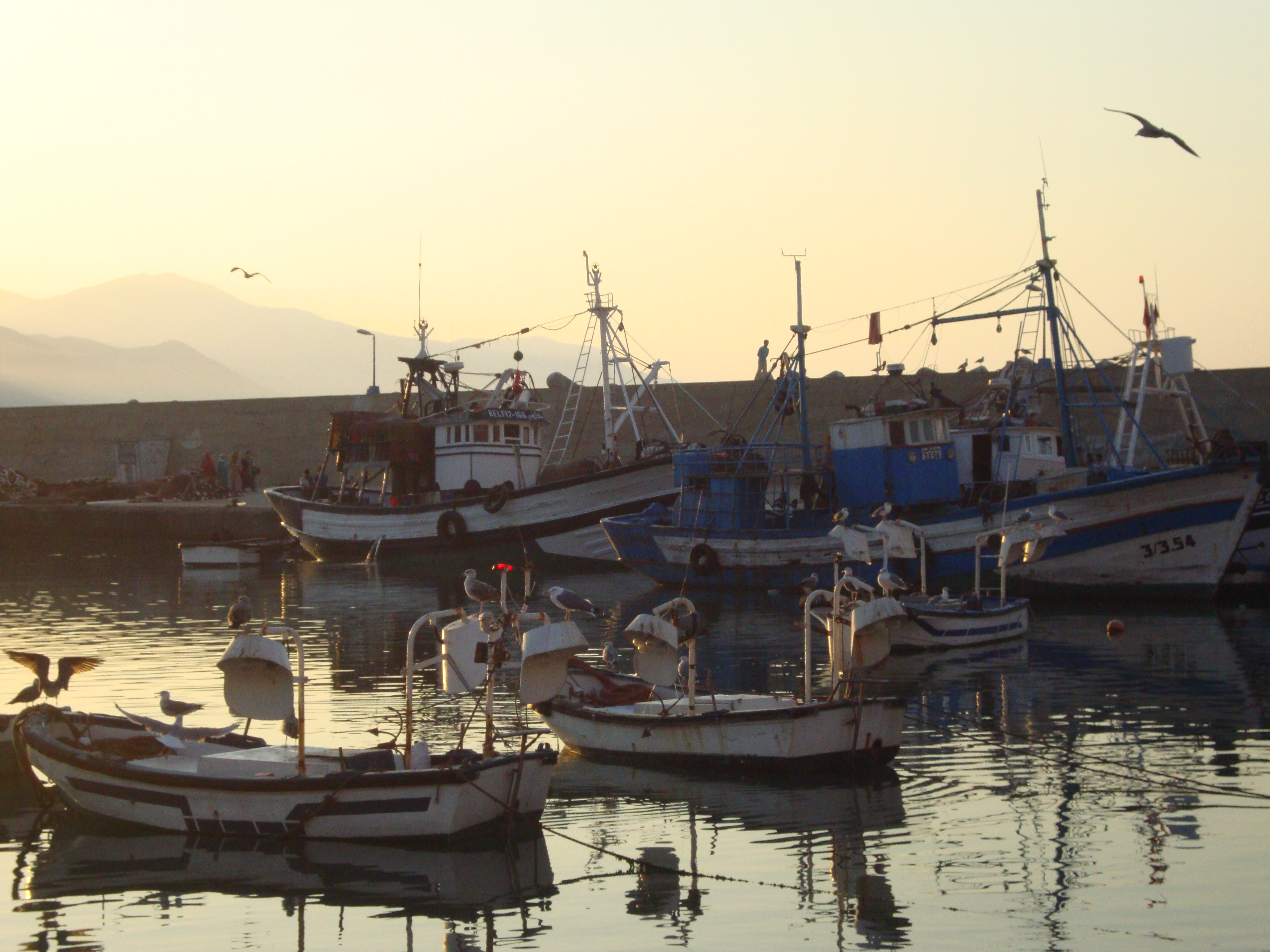 Cette prise de vue du port de Jebha a été prise fin septembre. Jebha est une bourgade de ancienne mais demeurée jusqu'à une date récente une enclave survivant de la pêche artisanale et d'agriculture vivrière, mode de vie typique de la côte des Ghorra (Chaîne du Rif Occidental, Nord du Maroc).